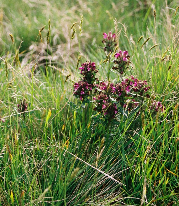 Pedicularis sudetica (gnidosz sudecki) / Giant Mts. (Karkonosze)